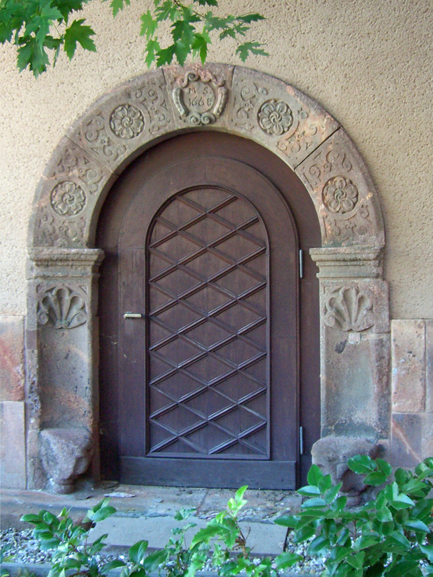 Portal aus dem Hof des Alten Johannishospitals in Leipzig, jetzt neben dem Eingang zum Grassimuseum